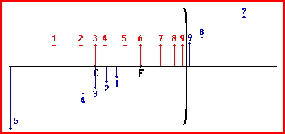 Predmet in slika za različne oddaljenosti predmeta od konkavnega zrcala.